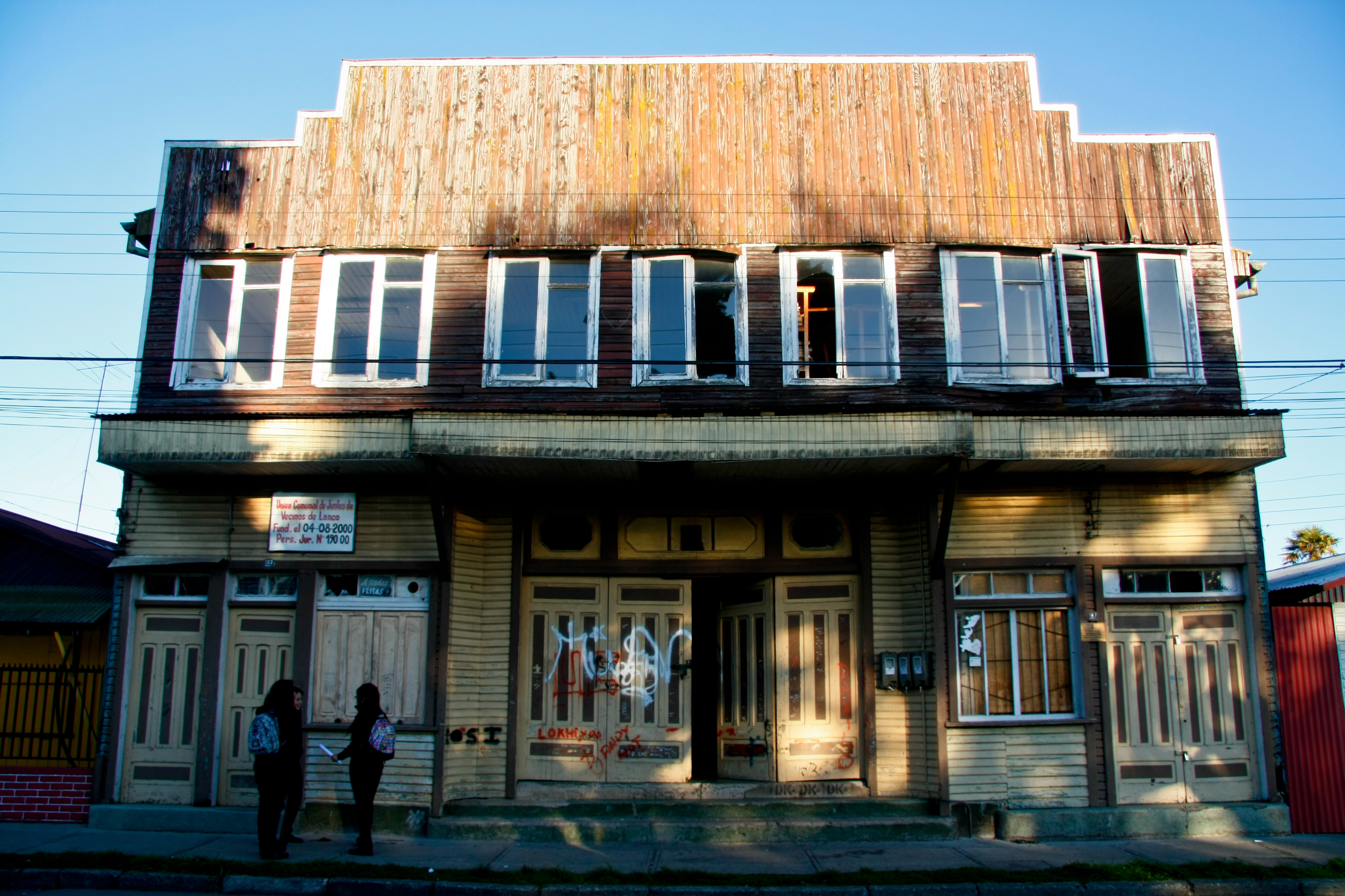 Teatro Galia This is a photo of a national monument in Chile: 2233